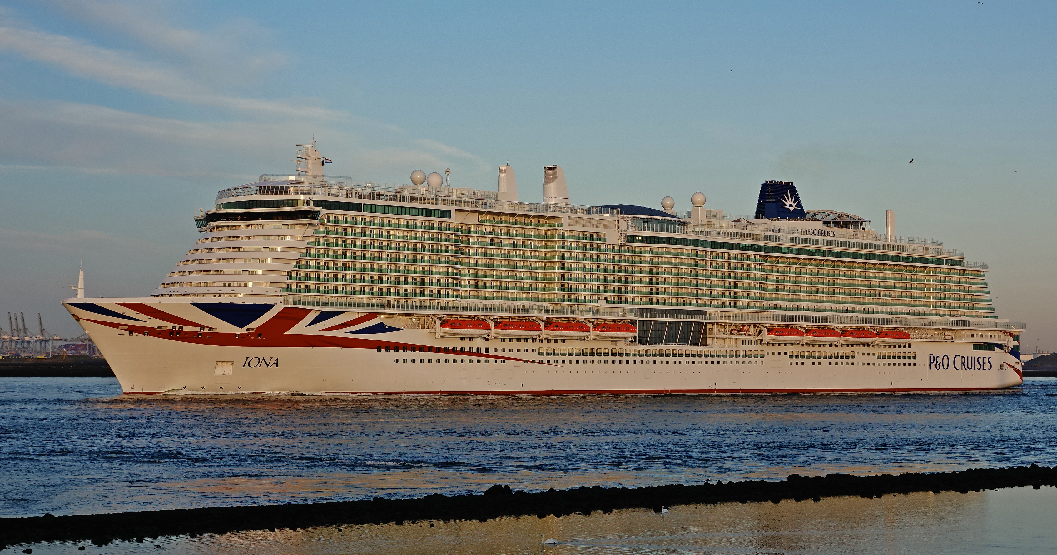 Hoek van Holland 2-6-2020